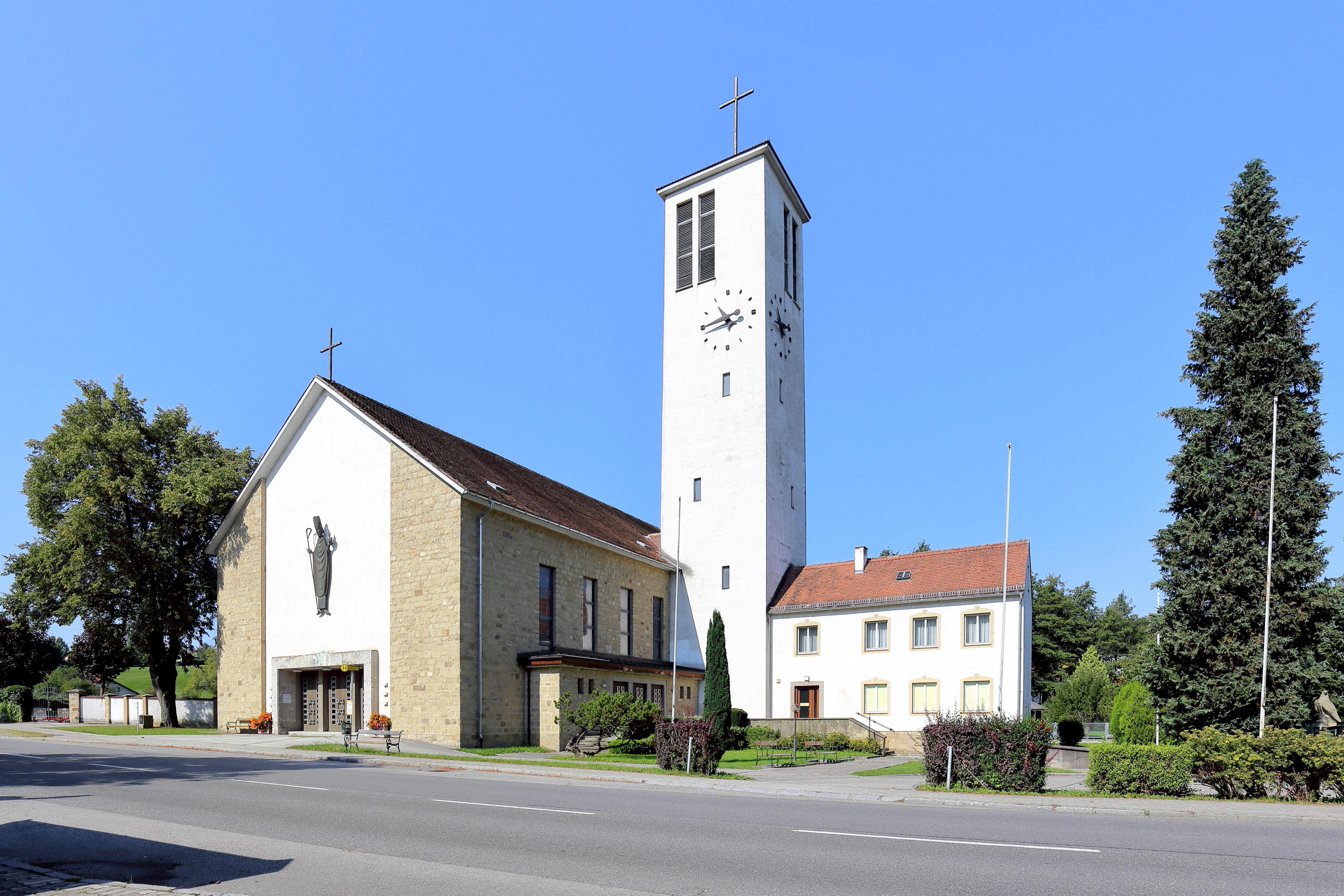 Ostansicht der röm.-kath. Filialkirche hl. Augustin in Innermanzing, ein Ortsteil der niederösterreichischen Gemeinde Neustift-Innermanzing.Die Kirche wurde auf Initiative von August Khary und nach Plänen von Walter Prutscher errichtet. Die Grundsteinlegung erfolgte am 15. Mai 1955. Das Turmkreuz des 40 m hohen Turmes und vier Glocken wurden im Herbst 1956 geweiht und die Kirche selbst 1967.